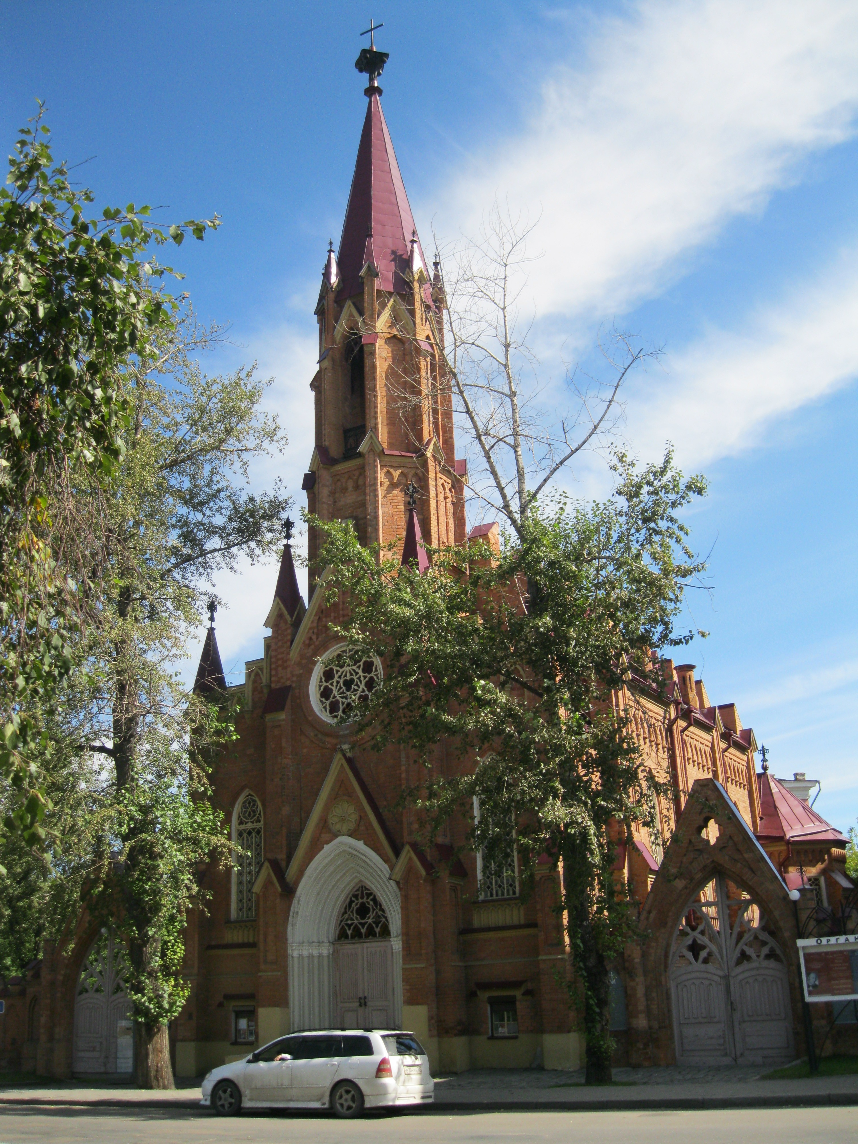 Католический храм Покрова Богородицы